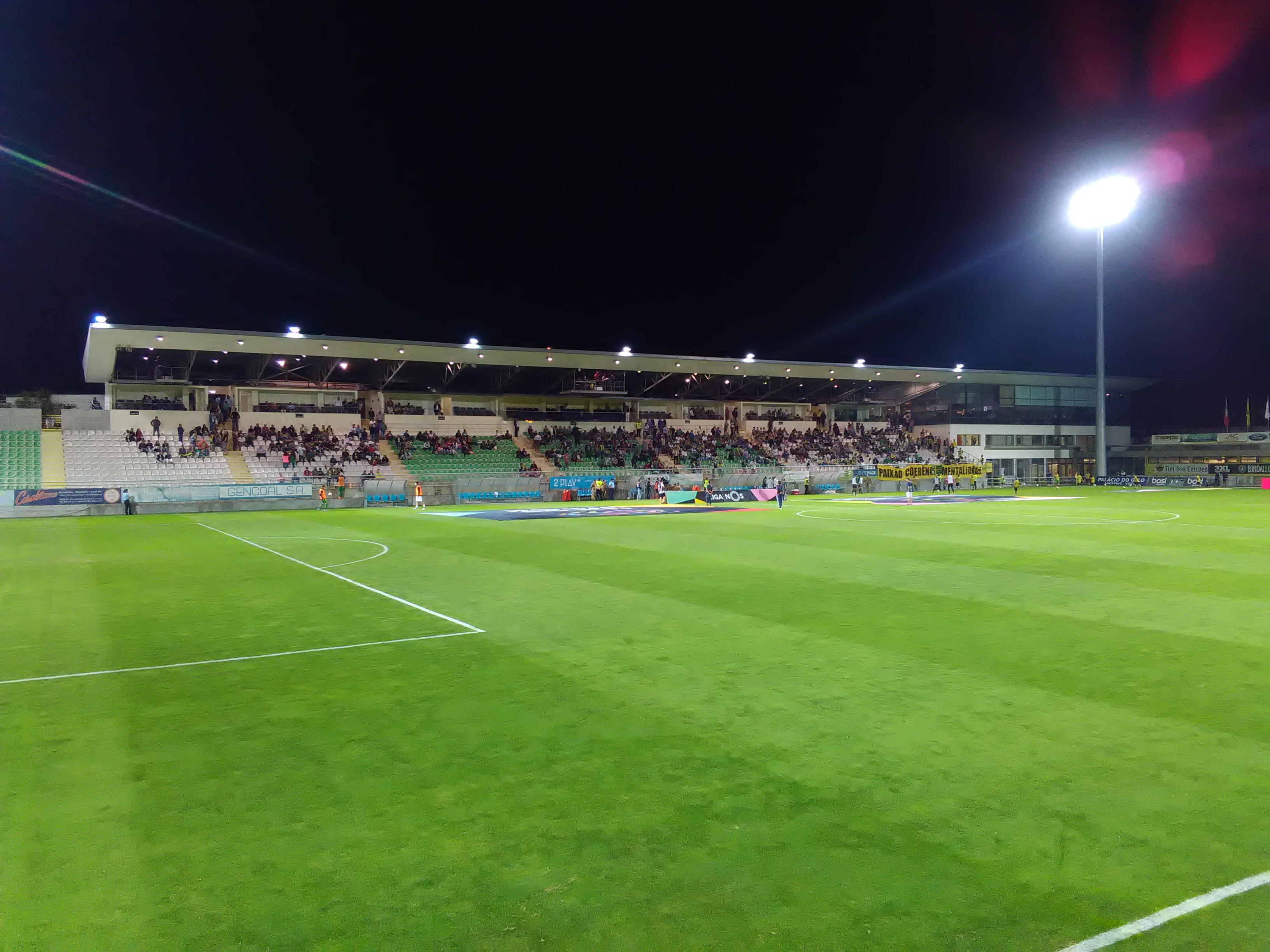 Estádio João Cardoso, casa do Clube Desportivo de Tondela